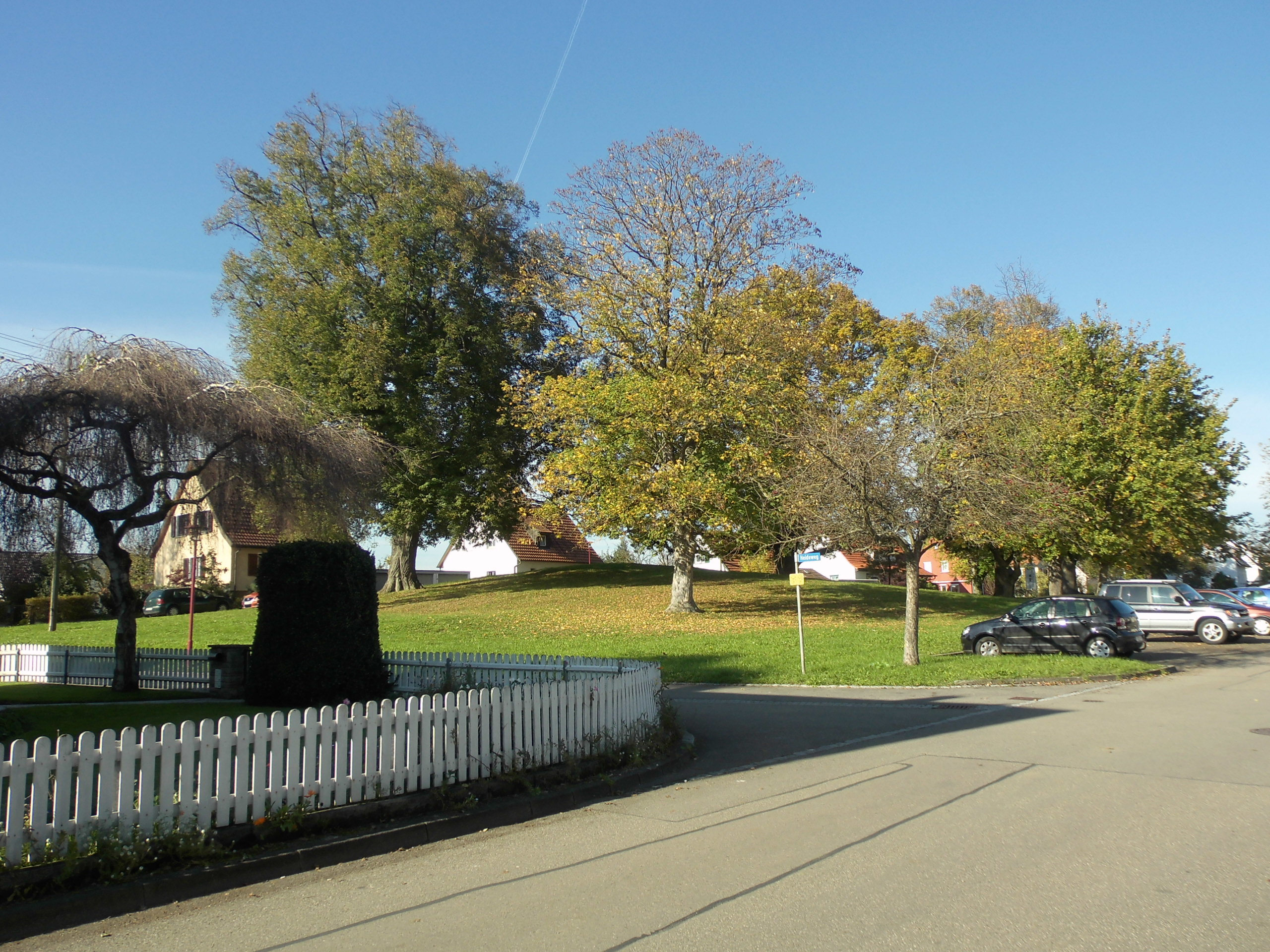 Der Eichenbuckel in Dußlingen ist ein Kelten Fürstengrab, auf dem das Naturdenkmal 1 Traubeneiche, 1 Winterlinde, "Eichenbuckel" (84160110082) steht. Ansicht von Südost.